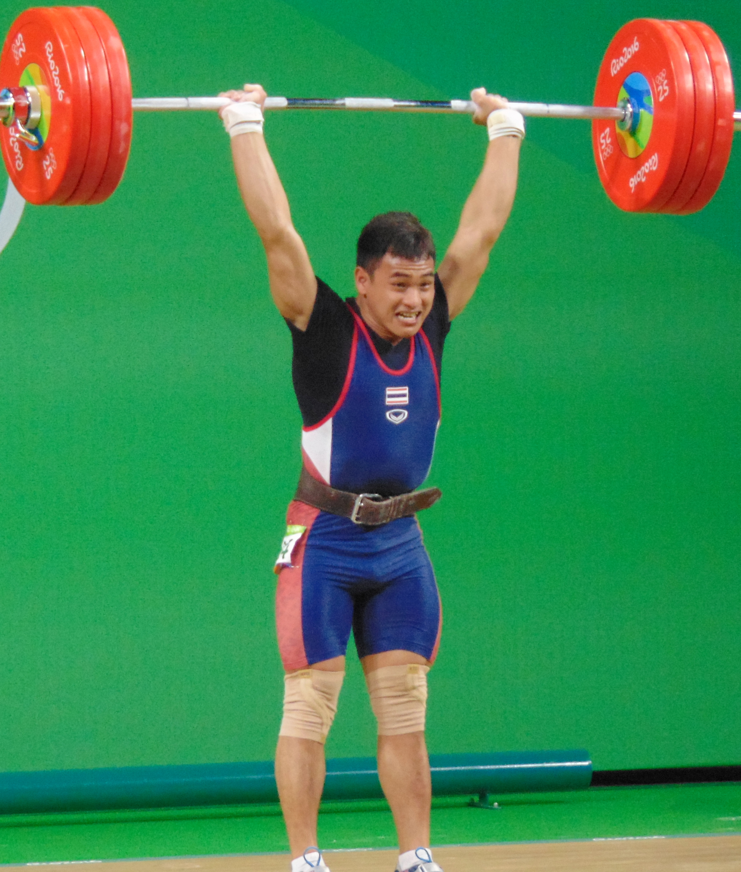 Rio 2016 - Weightlifting men's 69 kg